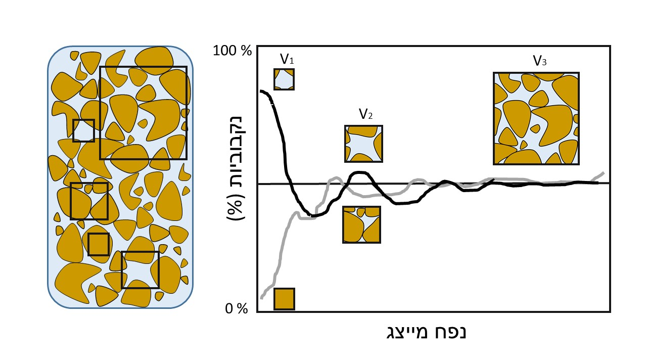 תיאור סכמטי הממחיש את משמעות בחירת נפח הבקרה בחישוב הנקבוביות בתווך